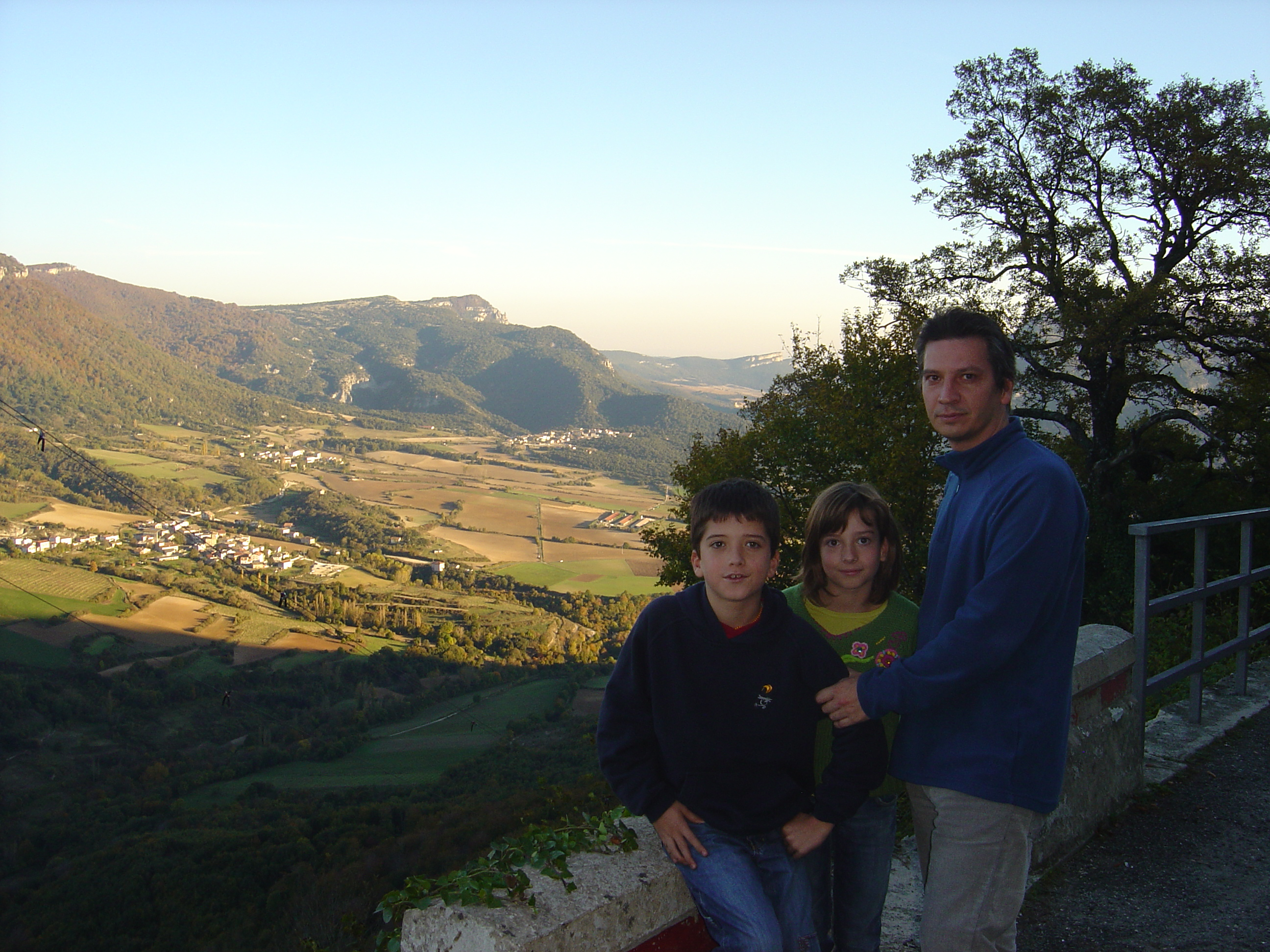 Amescoa Baja. Navarra. Spain/Campos de Artaza desde el puerto de Zudaire